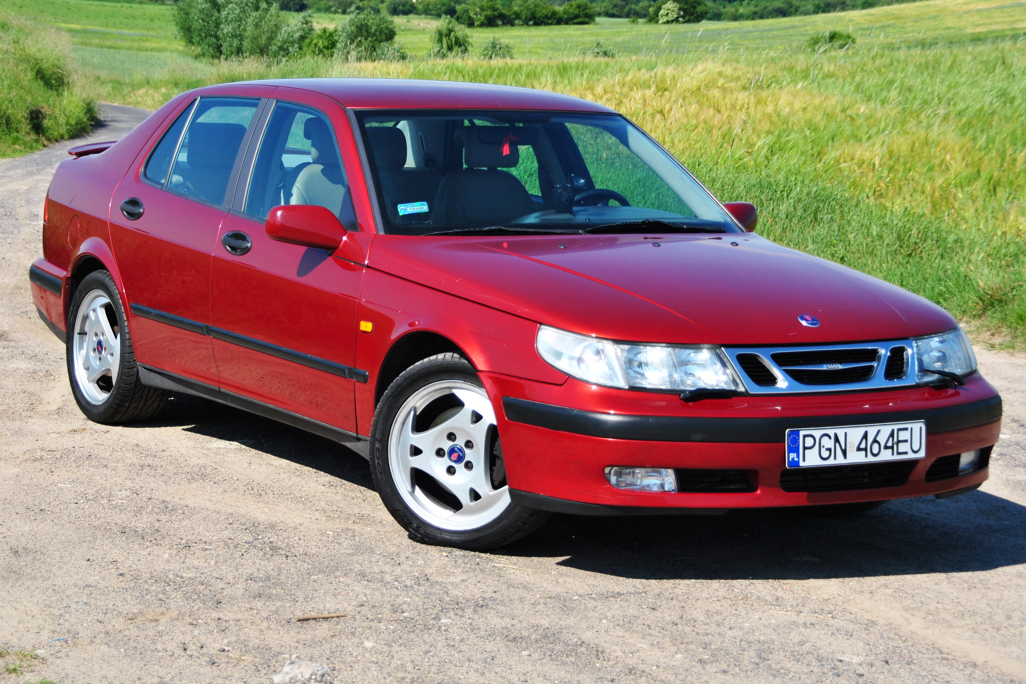 Saab 9-5 I SE z roku 1998 przód z alufelgami z wersji Aero